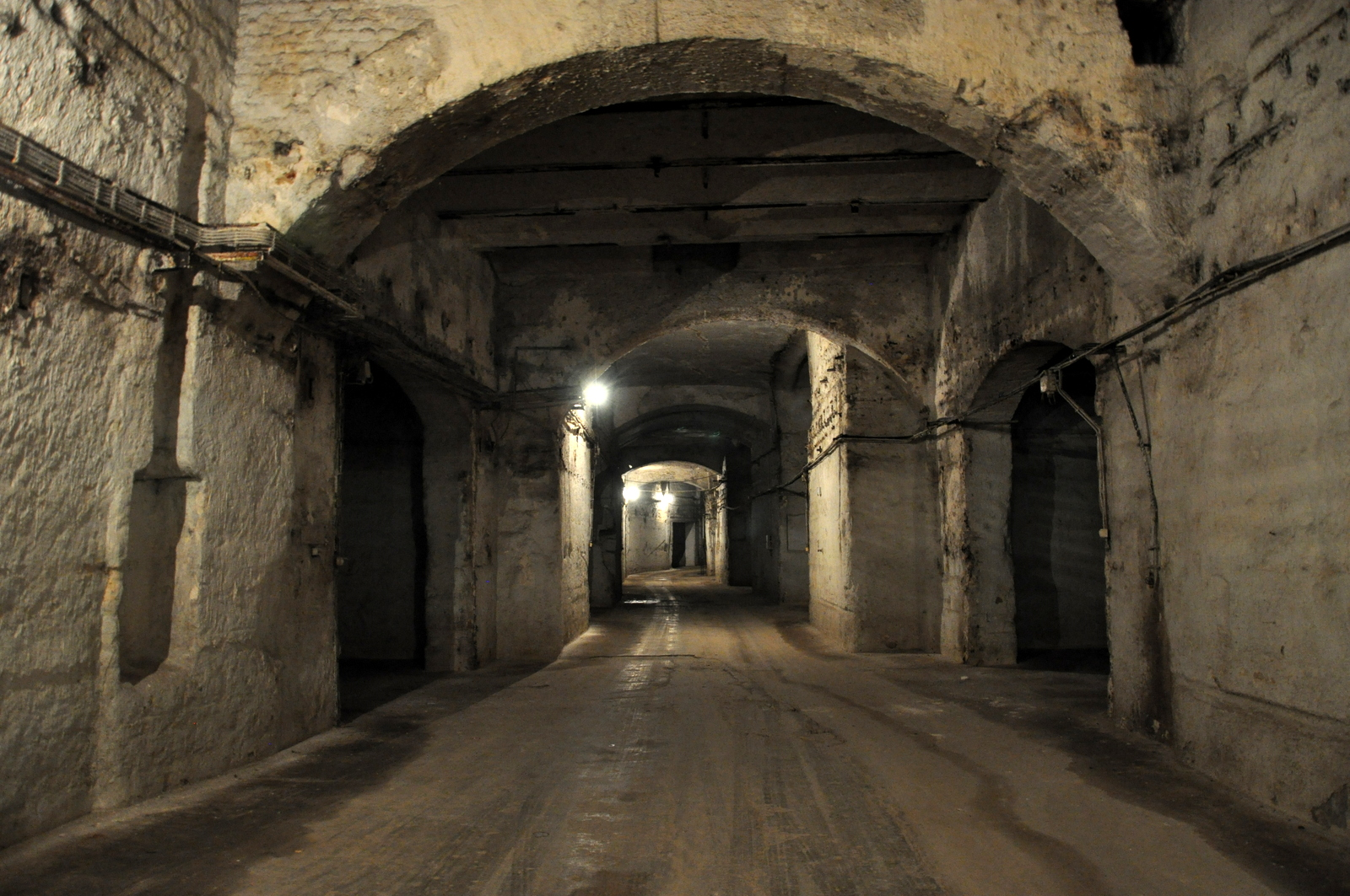 Kőbánya limestone mine